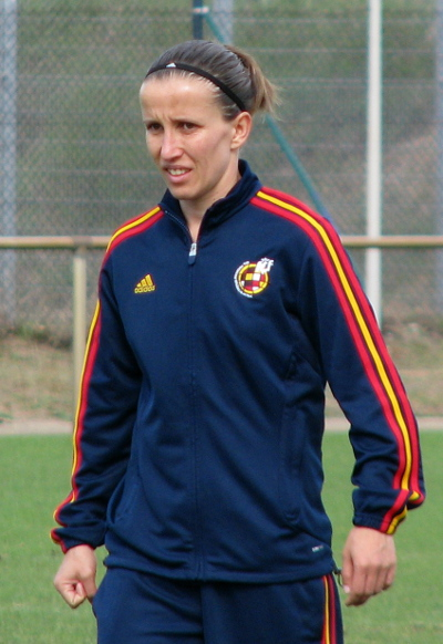 Sonia Bermúdez Tribano, spanische Nationalspielerin